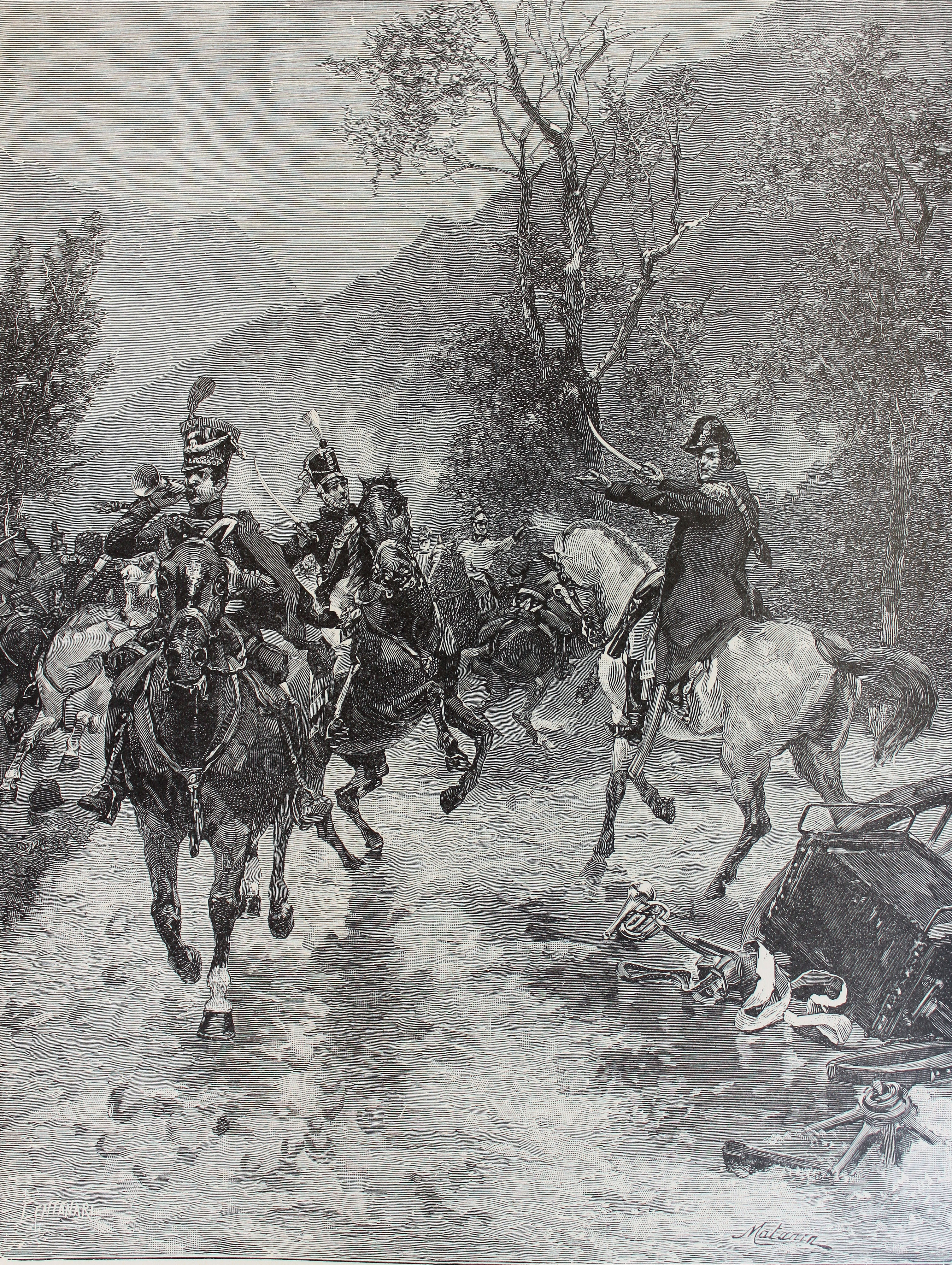 Ilustraciones de la obra : Storia del Risorgimento italiano / il. Edoardo Matania - Milano Fratelli Treves, 1935